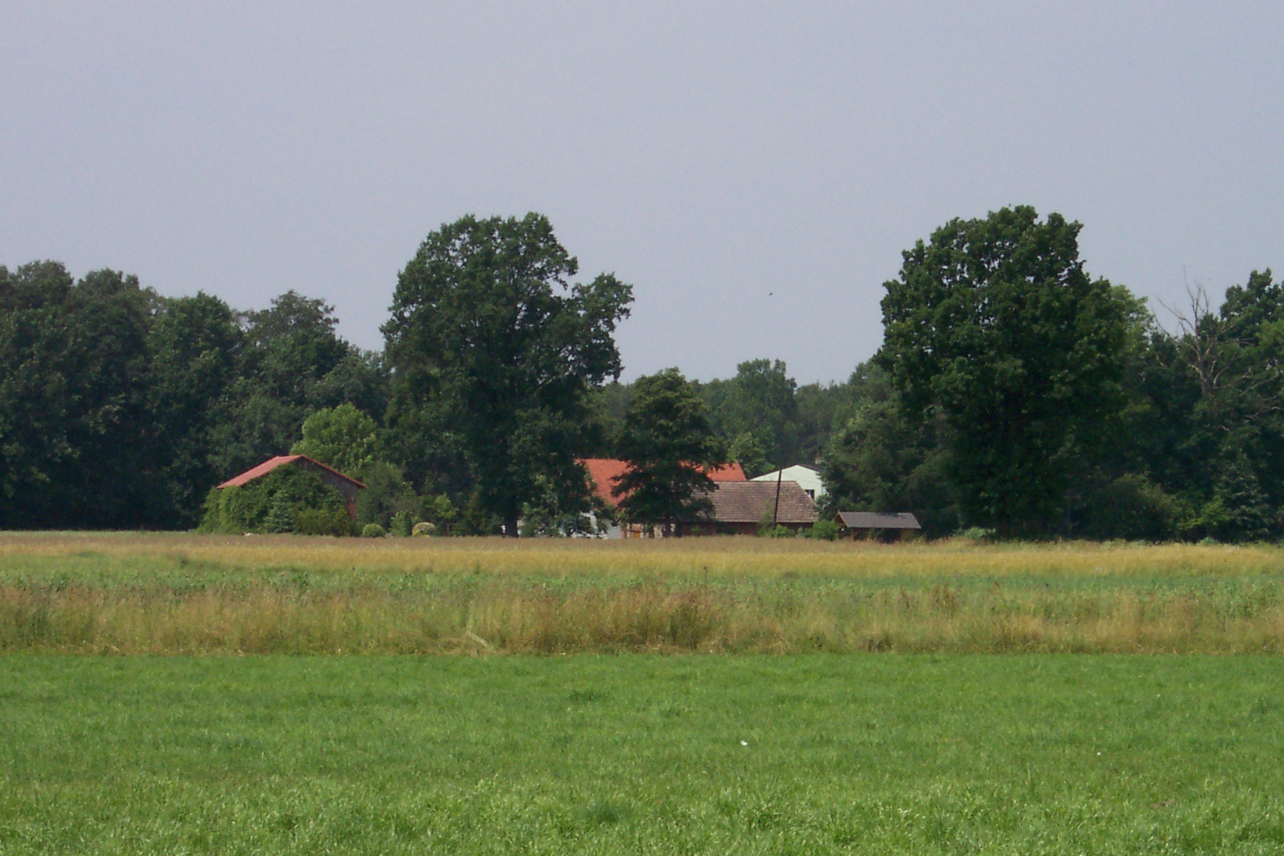 Jedno z najwcześniej wzmiankowanych miejsc zabudowy w Gwoździanach; w tym miejscu stał kiedyś młyn